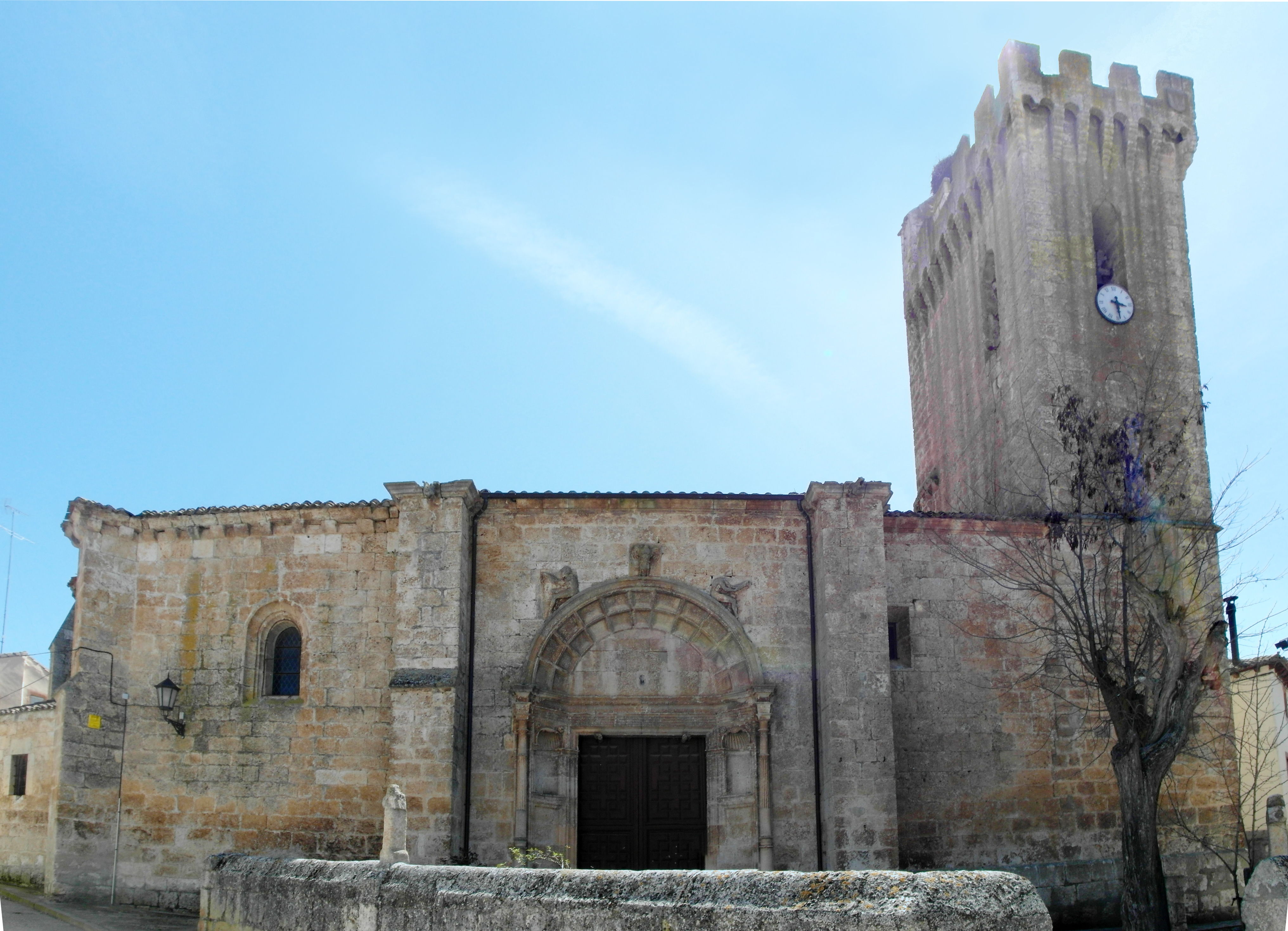 Iglesia de San Pedro, Gumiel de Mercado, Burgos.